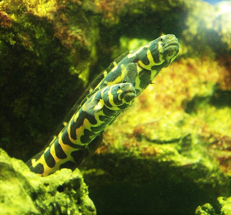 Pareja de Pholidichthys leucotaenia en el Sunshine International Aquarium, Tokio, Japón